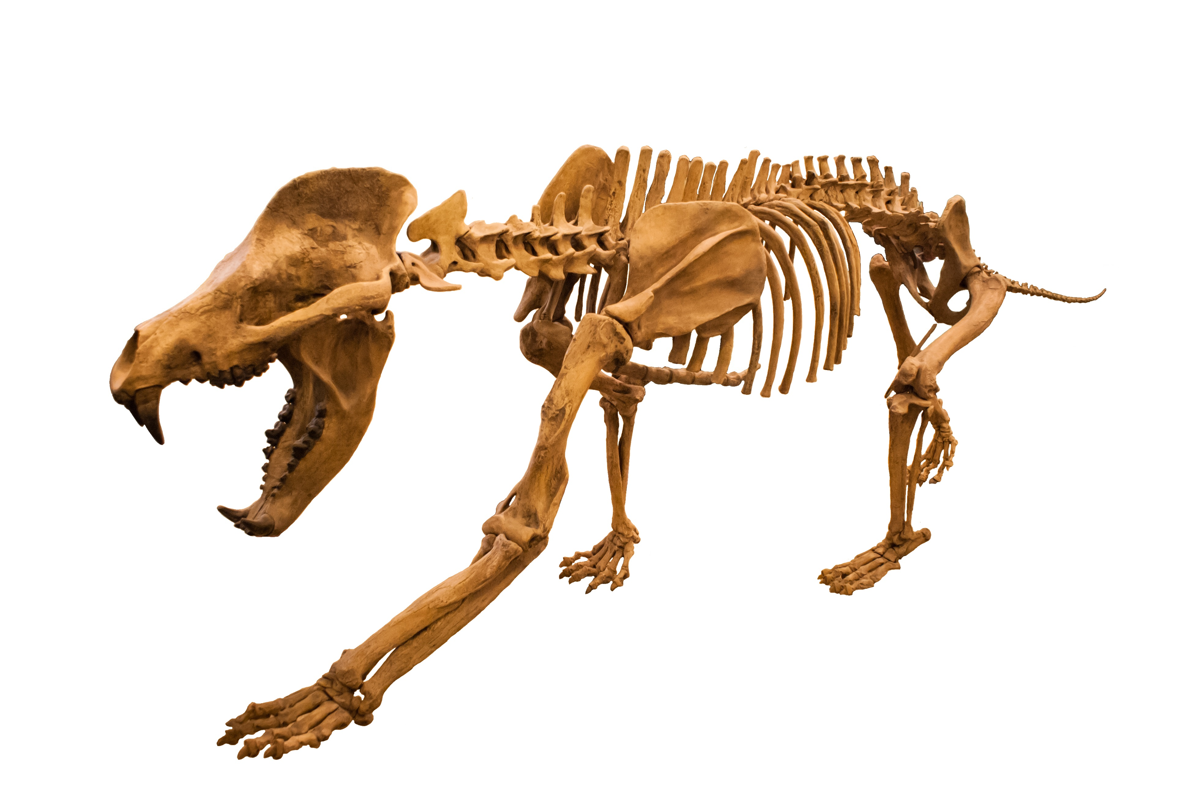 Amphicyon ingens skeleton